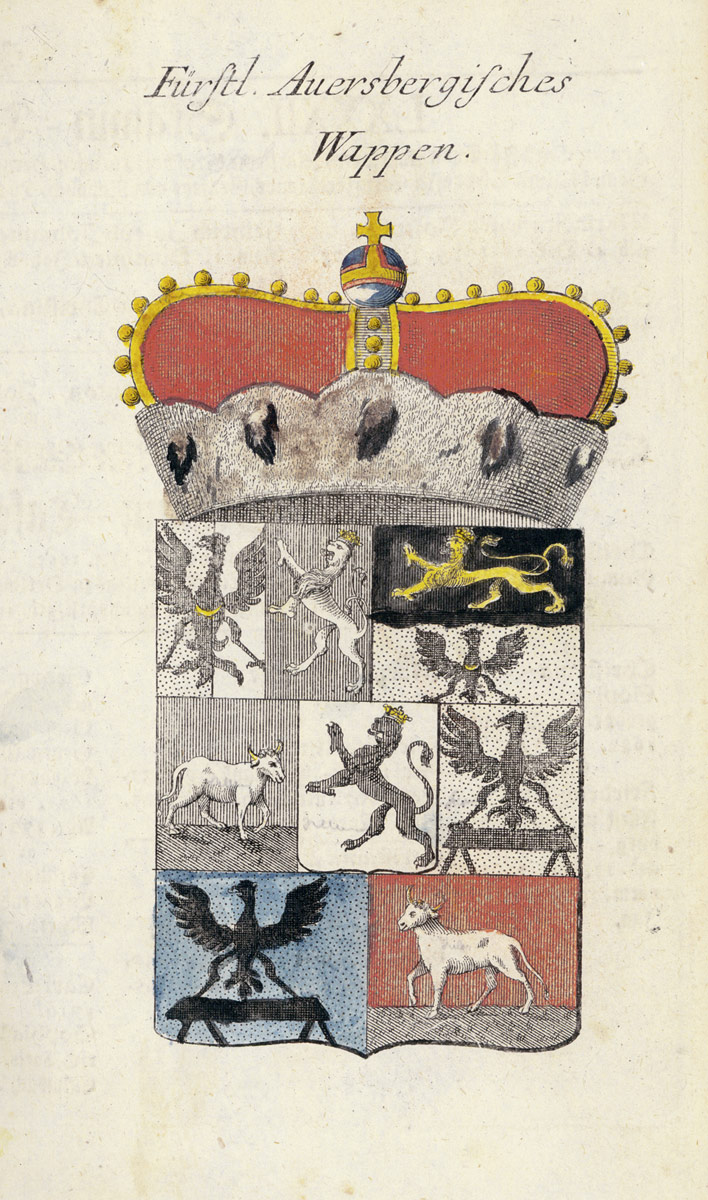 Fürstlich Auerspergisches Wappen, aus: Der Durchlauchtigen Welt zum funffzehendemal neu vermehrter und verbesserter Geschichts- Geschlechts und Wappen- Calender auf das Jahr 1737, Nürnberg 1736, teilweise koloriert